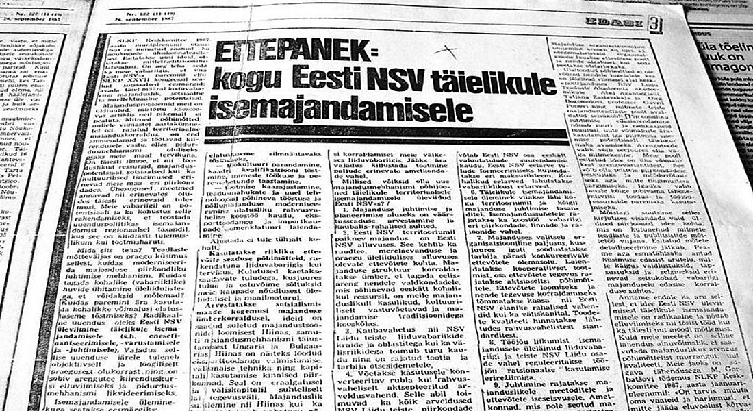 "Ettepanek: kogu Eesti NSV täielikule isemajandamisele" ajalehes Edasi.